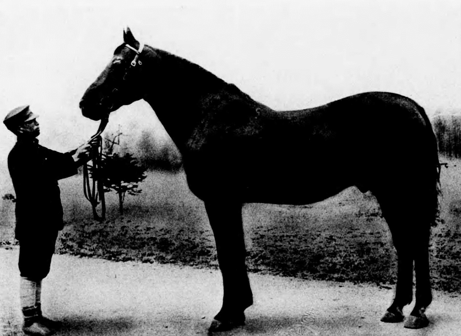 ギドラン種種牡馬ギドラン四二ノ一五